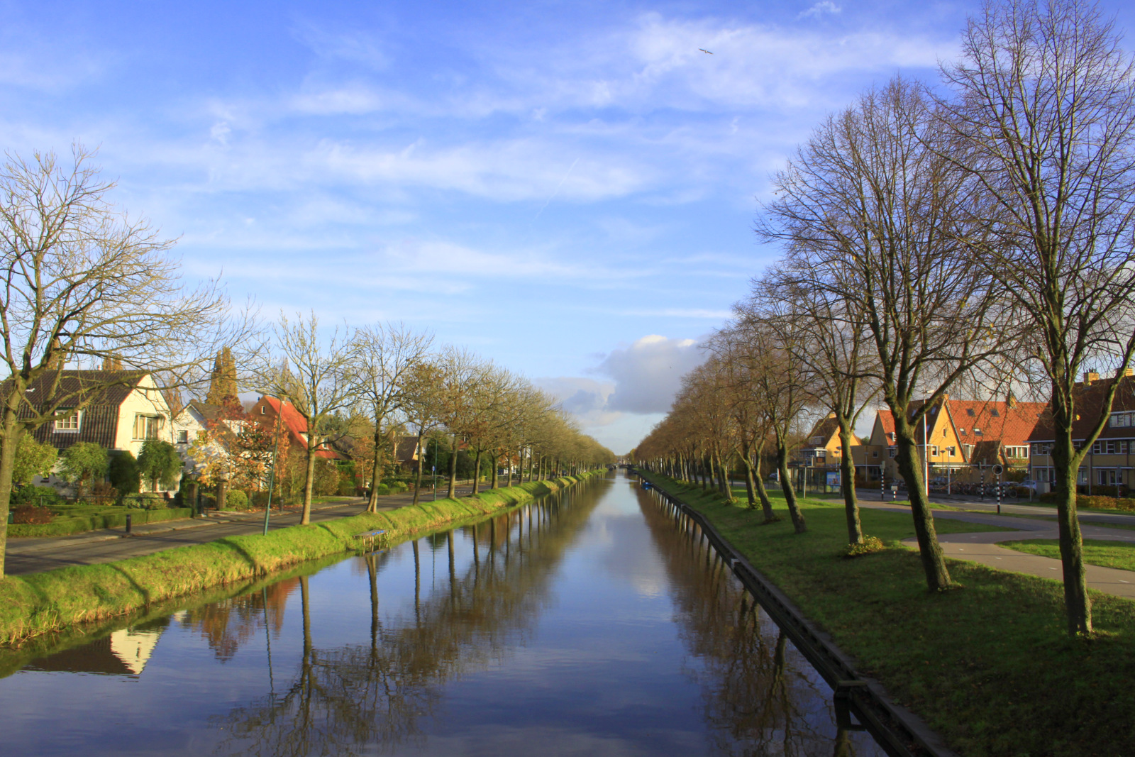 De Meern veranderd snel, veel nieuwbouw rondom het dorp, dat nu al een wijk is van de stad Utrecht.